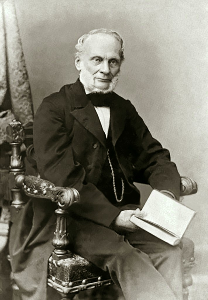 Рудольф Клаузиус